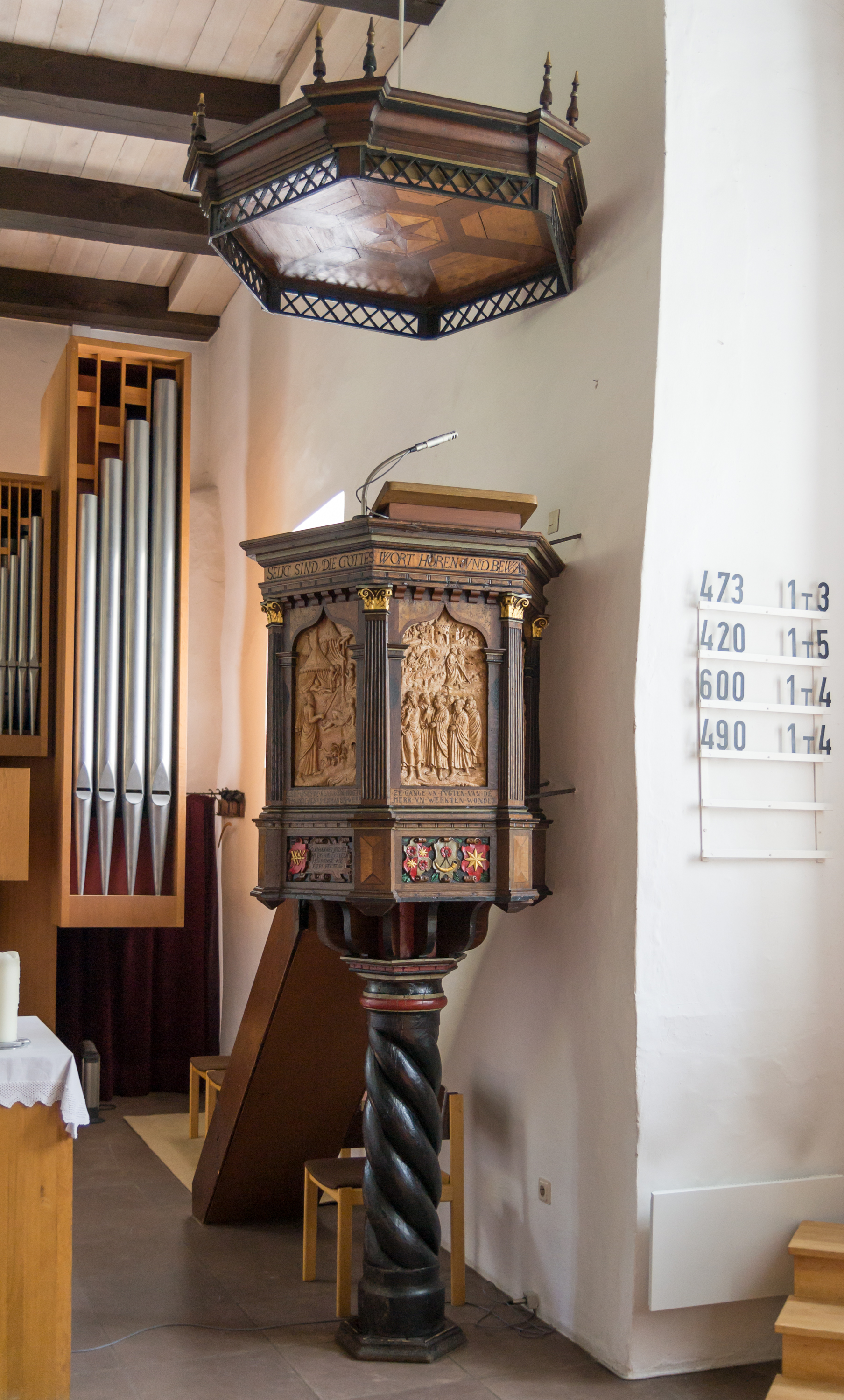 This image shows a heritage building in Germany, located in the North Rhine-Westphalian city Lügde (no. 87). Evangelische Kirche Elbrinxen